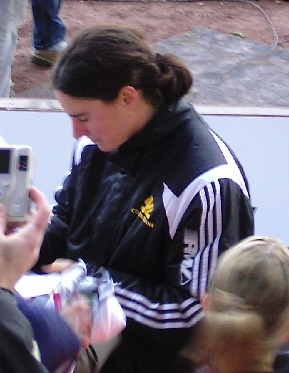 Birgit Prinz